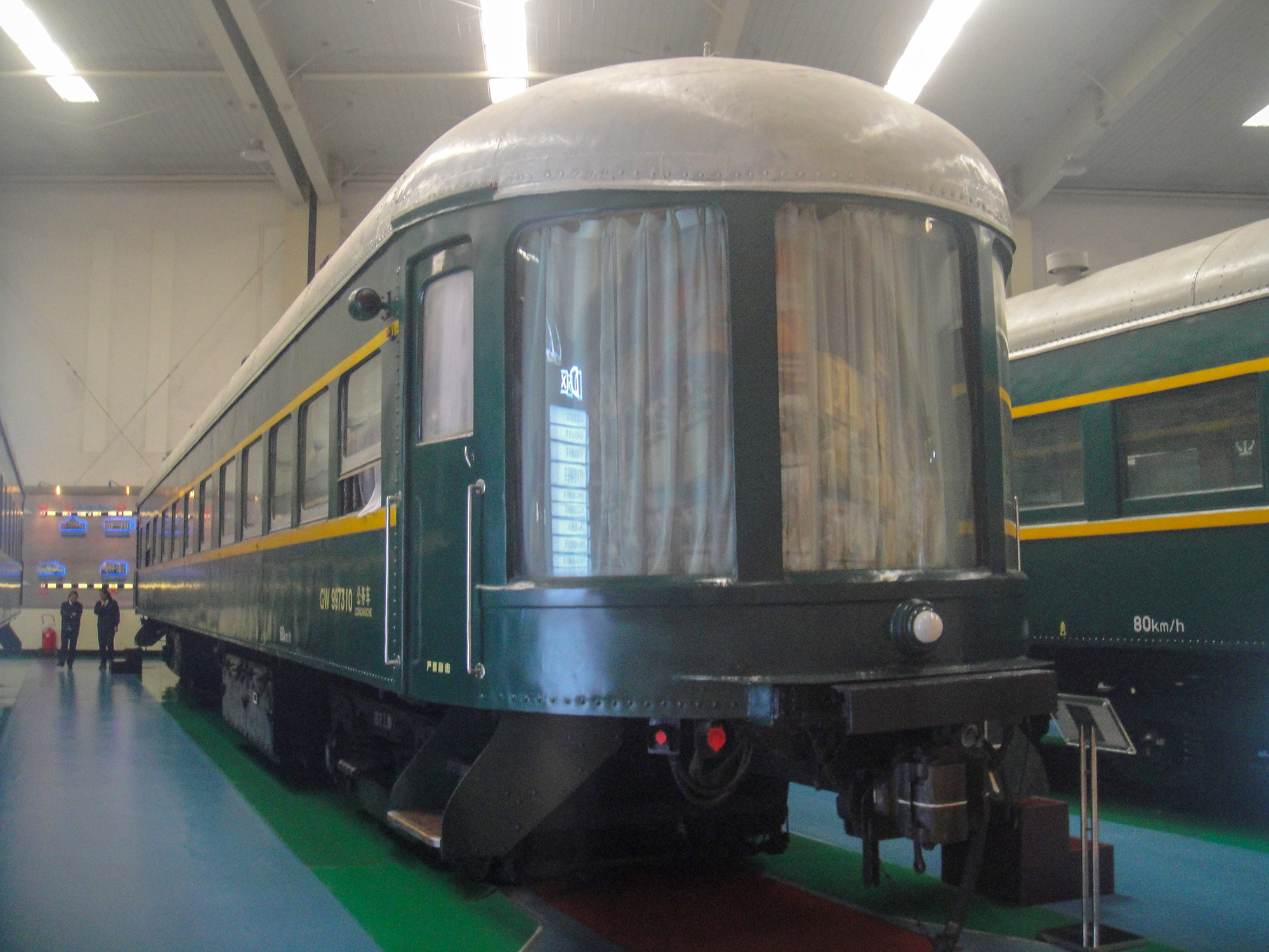 沈阳铁路陈列馆展出的公务车